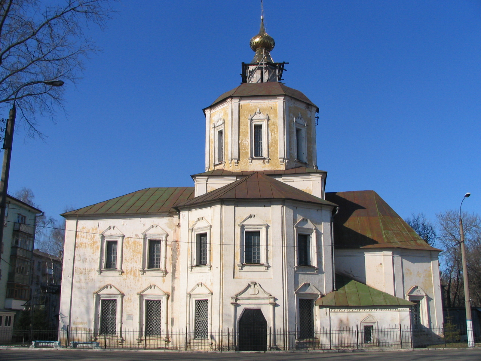 Uspenski church Tver, Russia